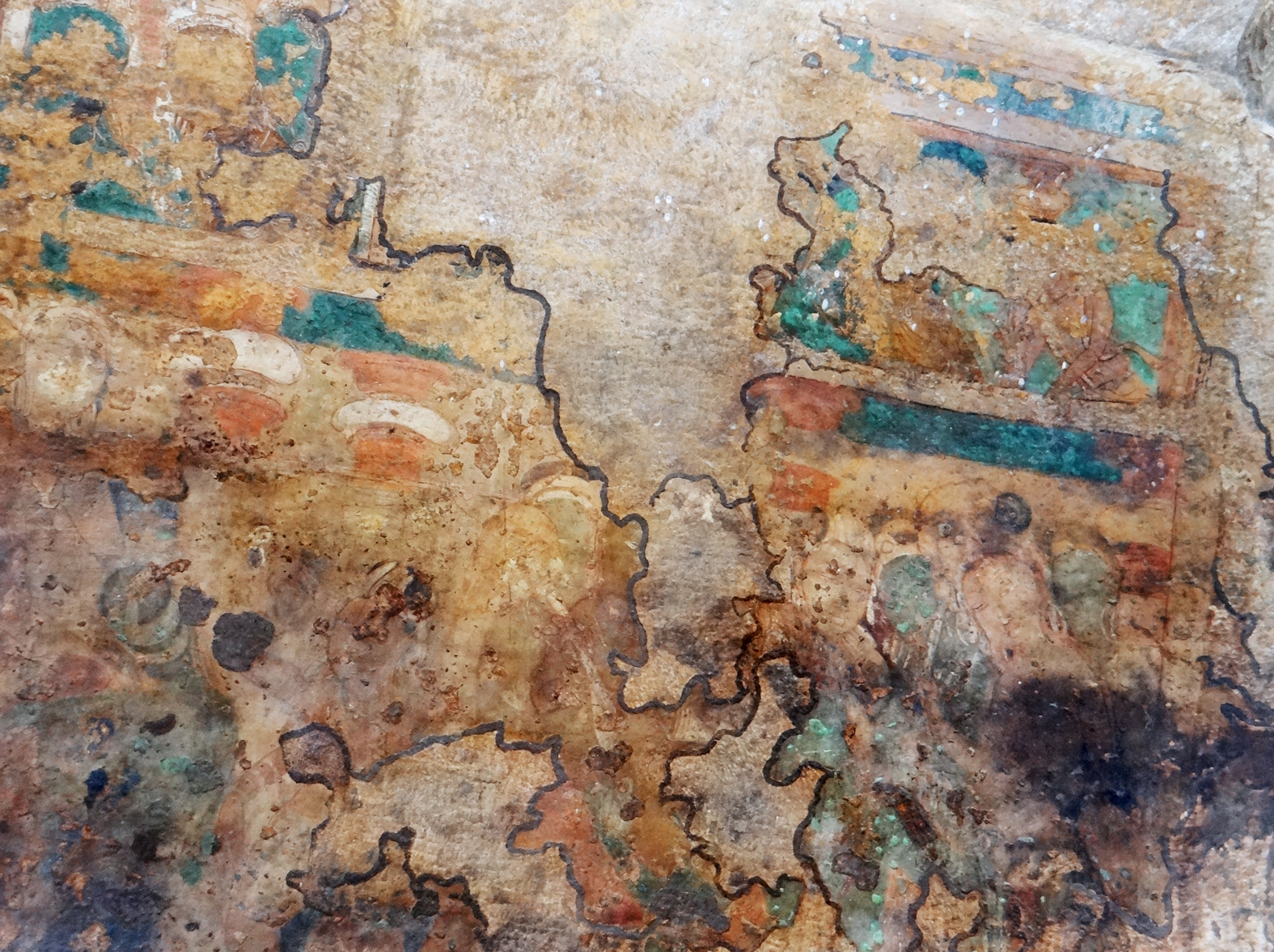 Peintures murales du mandapa du grand temple troglodytique dédié à Vishnou (grottes de Badami) Ce temple, creusé dans le rocher et dédié à Vishnou, date de 578, c'est le plus grand et le plus beau des quatre temples en raison de la qualité des groupes sculptés (en consoles) et des reliefs sur les parois. Wikipedia sur Badami